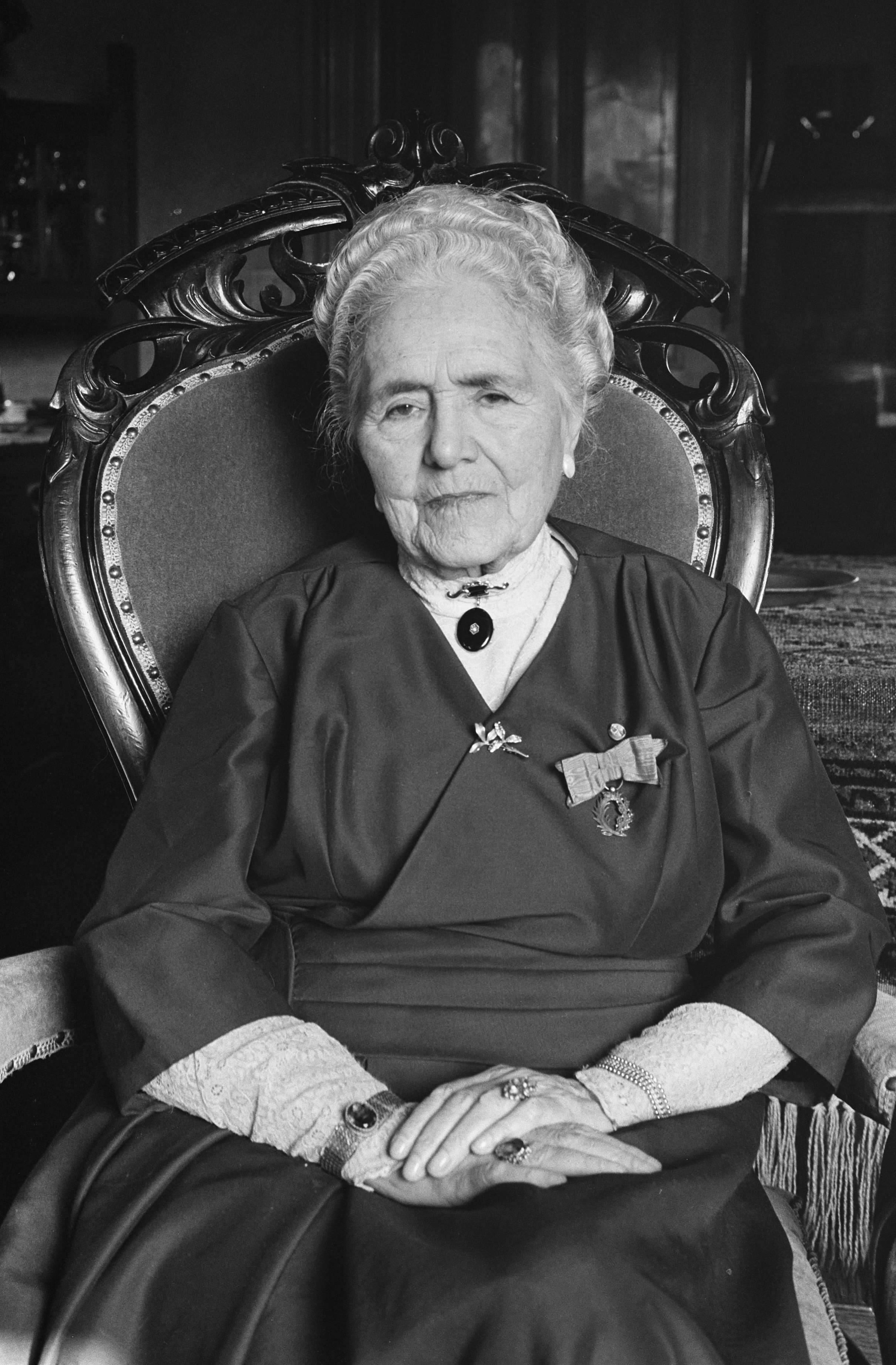 Collectie / Archief : Fotocollectie Anefo Reportage / Serie : [ onbekend ] Beschrijving : Rika Hopper 24 oktober a.s. 85 jaar (kop) Datum : 18 oktober 1962 Trefwoorden : portretten Persoonsnaam : Hopper, Rika Fotograaf : Pot, Harry / Anefo Auteursrechthebbende : Nationaal Archief Materiaalsoort : Negatief (zwart/wit) Nummer archiefinventaris : bekijk toegang 2.24.01.05 Bestanddeelnummer : 914-4243